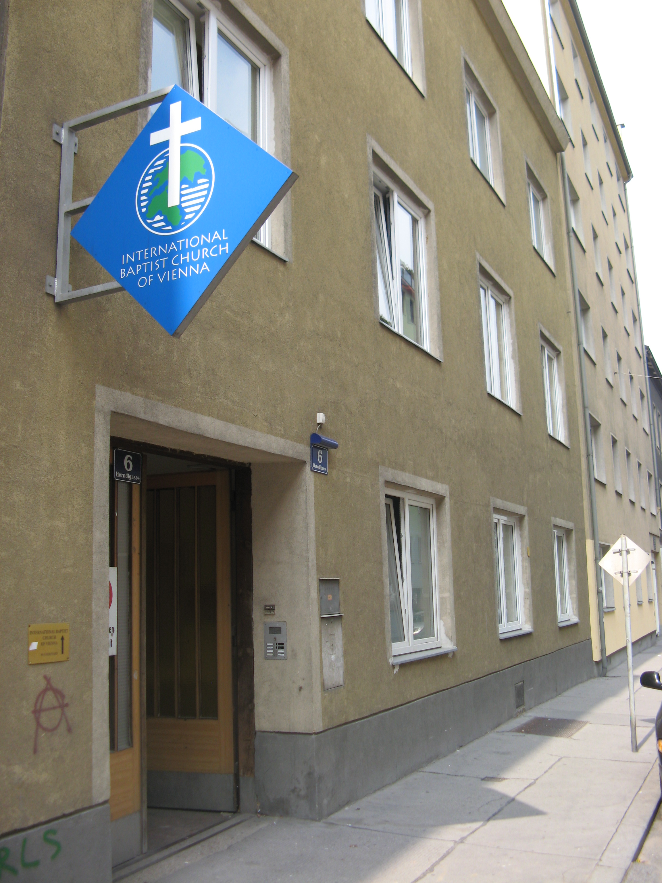 Baptistenkirche, Herndlgasse 6, Wien-Favoriten